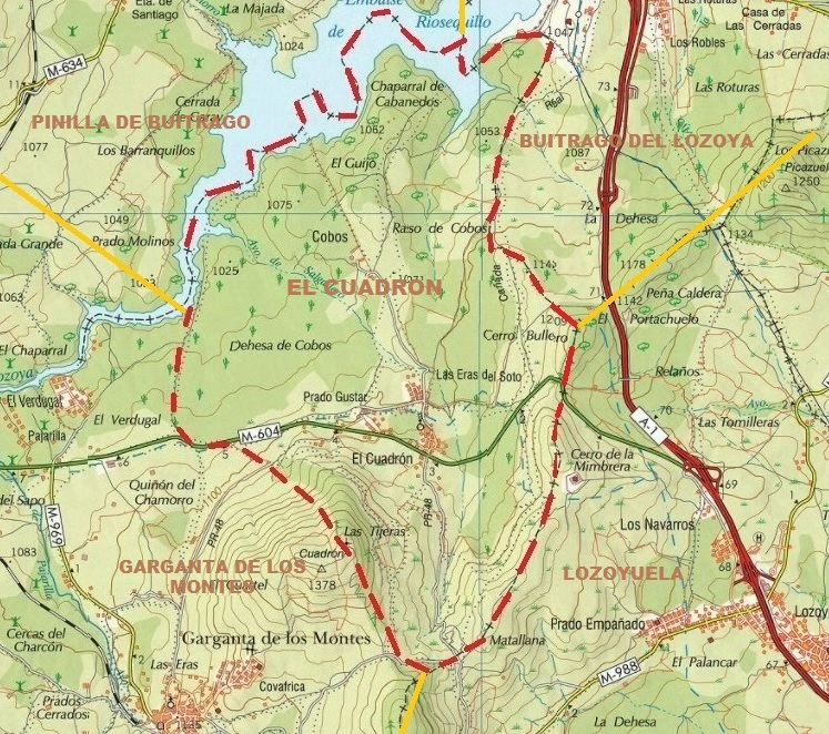 Mapa cartografico de El Cuadron, con municipios limitrofes